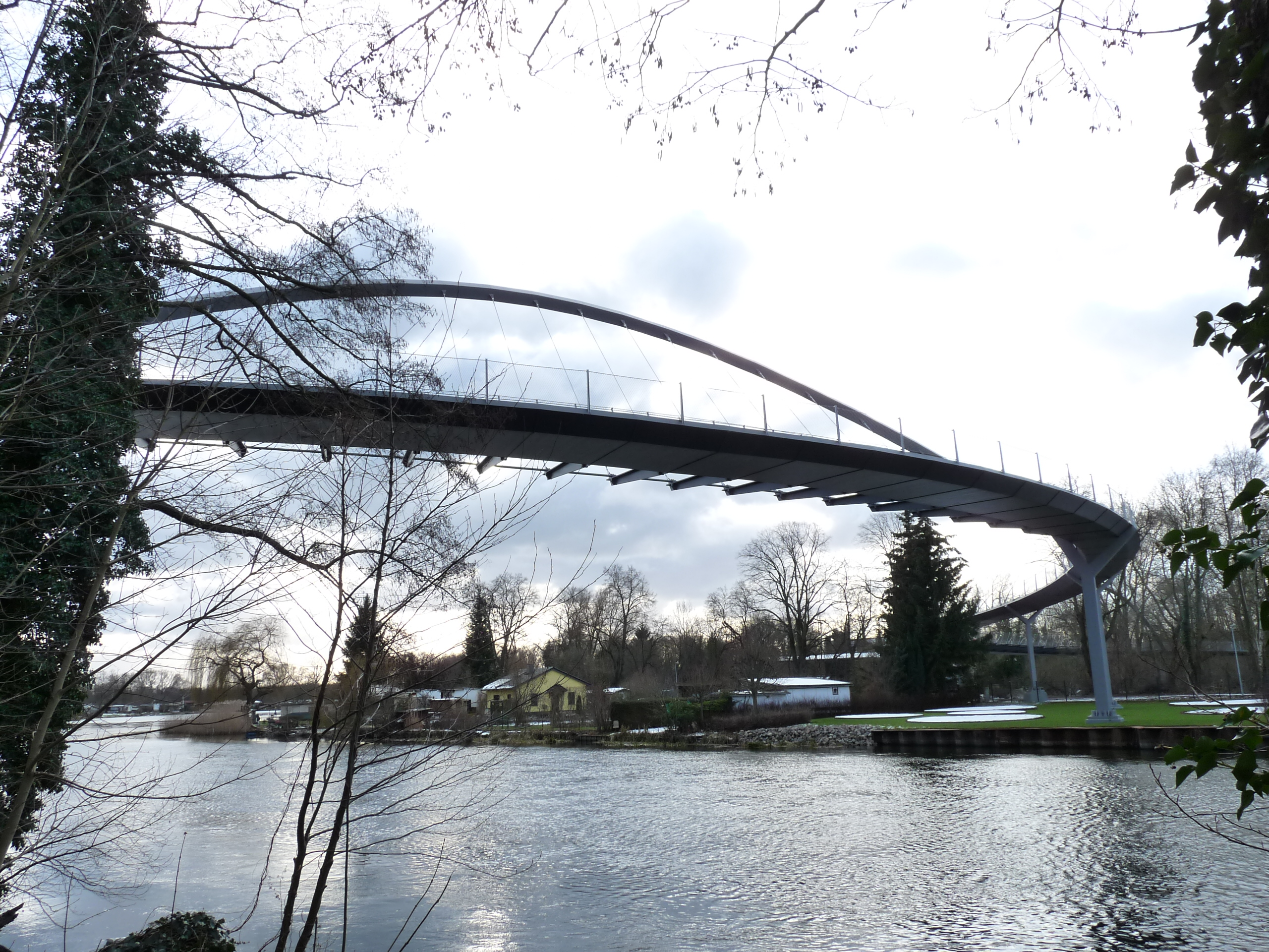 Die 348 Meter lange Weinbergbrücke schwingt sich in einem Bogen über zwei Havelarme und dem Altarm Hellers Loch und verbindet den Weinberg als Naherholungsstätte der Stadt und den Optikpark als Anziehungspunkt für Besucher der Bundesgartenschau. Erbaut wurde die Brücke 2012/14 im Rahmen der Vorbereitungen für die Bundesgartenschau 2015 in der Havelregion. Die Weinbergbrücke ermöglicht einen weiten Blick in die Havellandschaft und auf das BUGA-Areal.